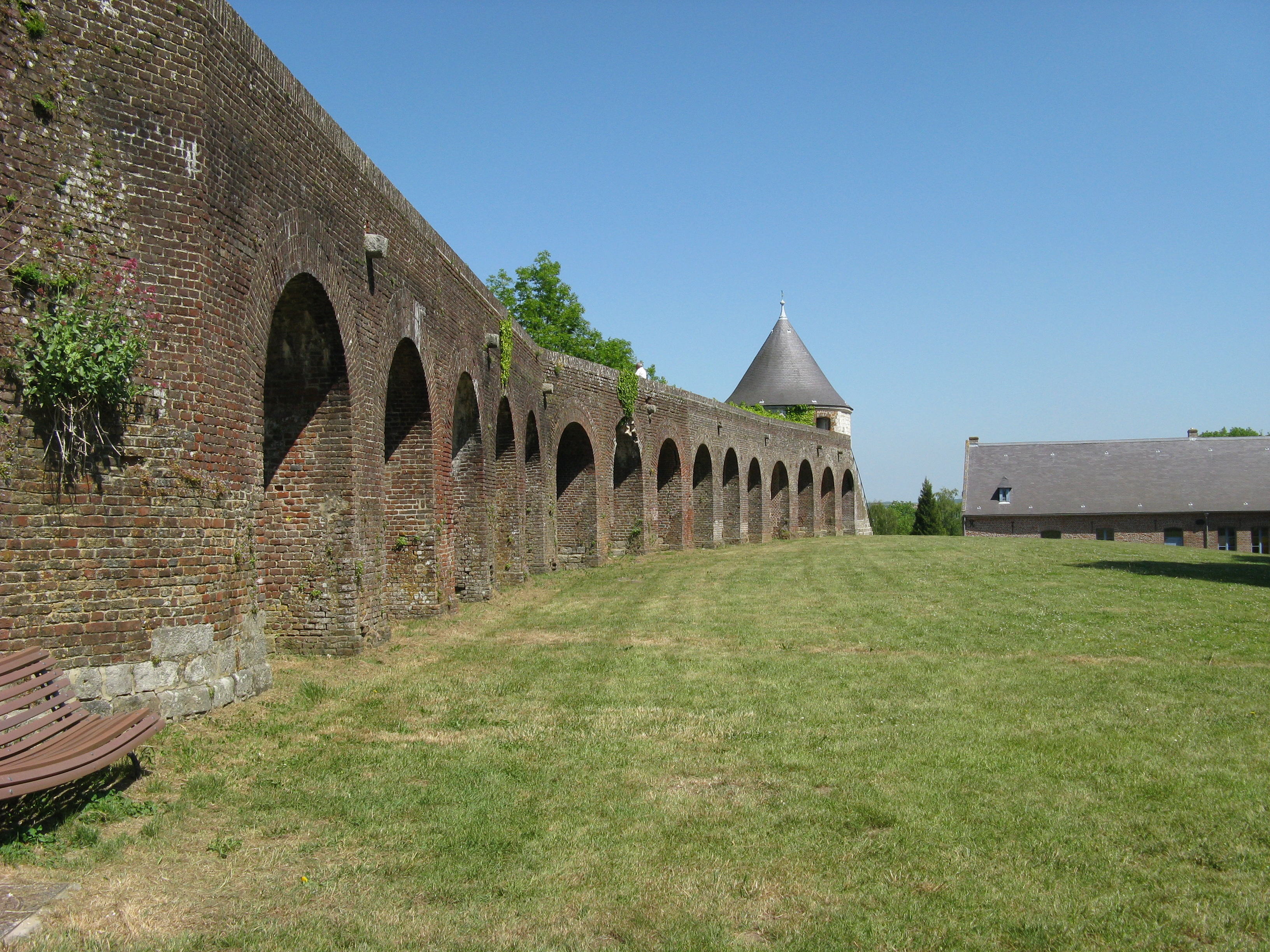 Les remparts Montreuil sur Mer